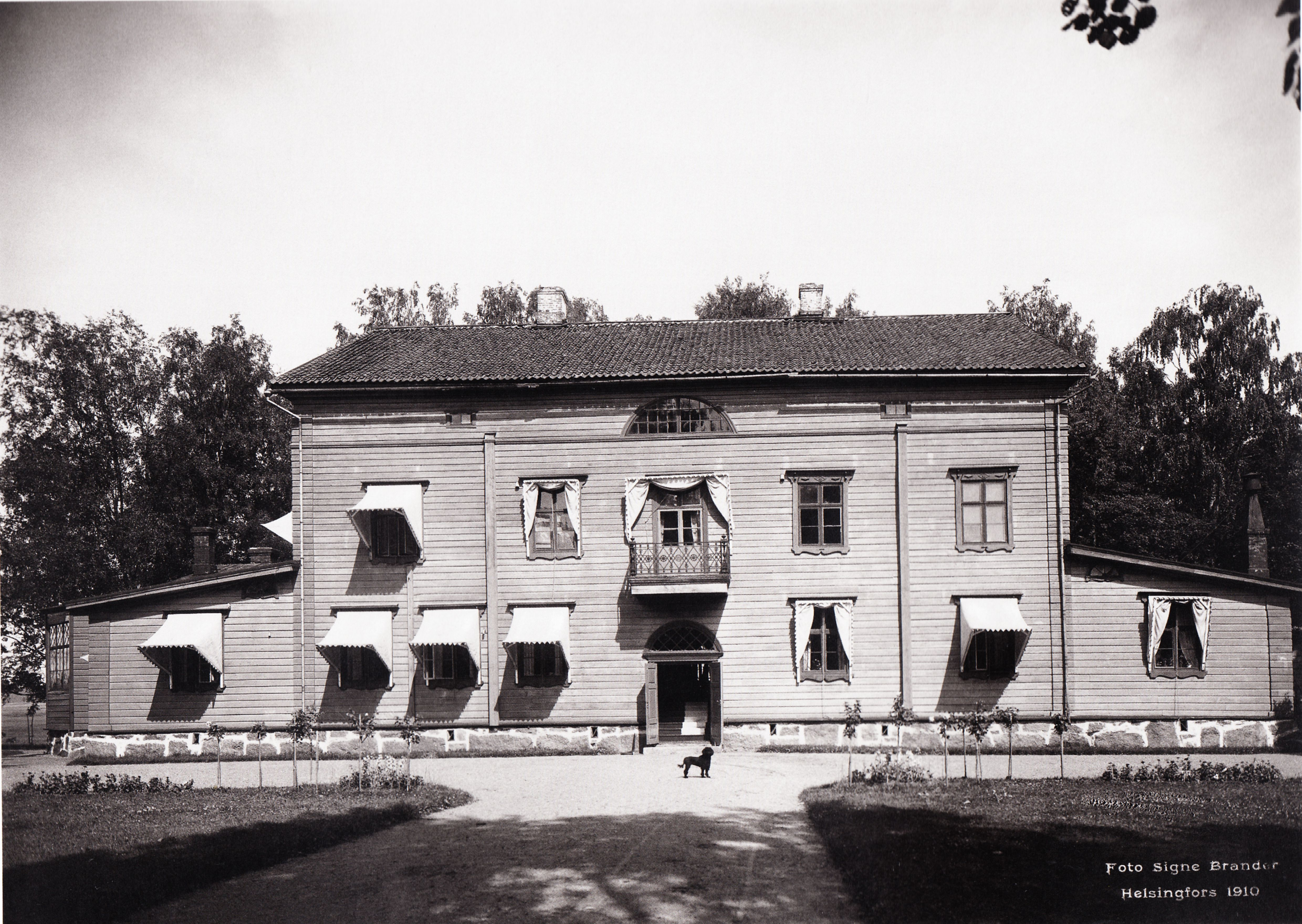 Peippolan kartano